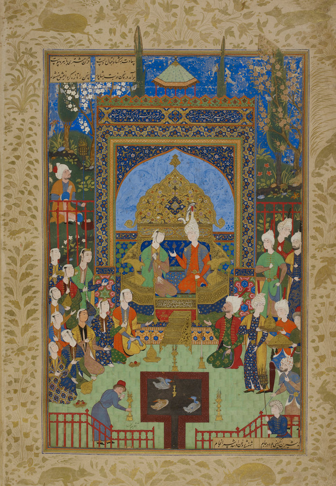 Ağa Mirək - Xosrov və Şirin qızların söylədiyi əfsanələri dinləyərkən, 1539-1543, Təbriz miniatür məktəbi